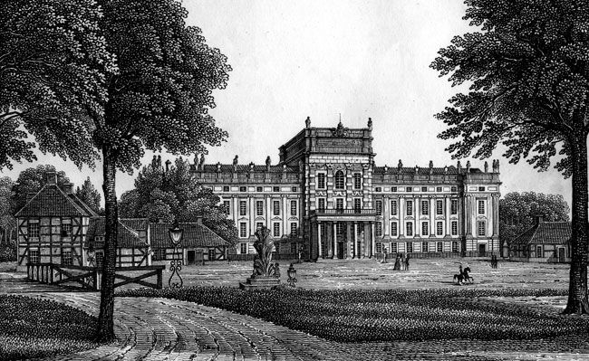 Schloss Ludwigslust um 1830